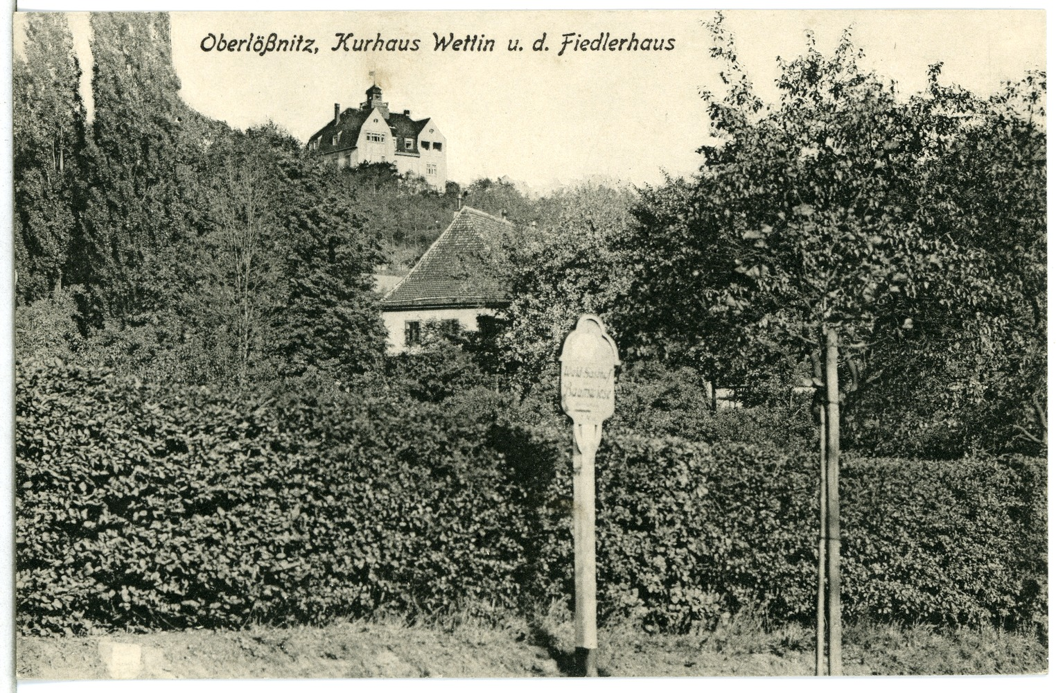 Oberlößnitz; Kurhaus Wettin und Fiedlerhaus This postcard is from publisher Brück & Sohn in Meißen ( postcard has a unique number 14256 and is available in a higher resolution at the publisher. This images was uploaded in a cooperation project between Wikipedians and the publisher.